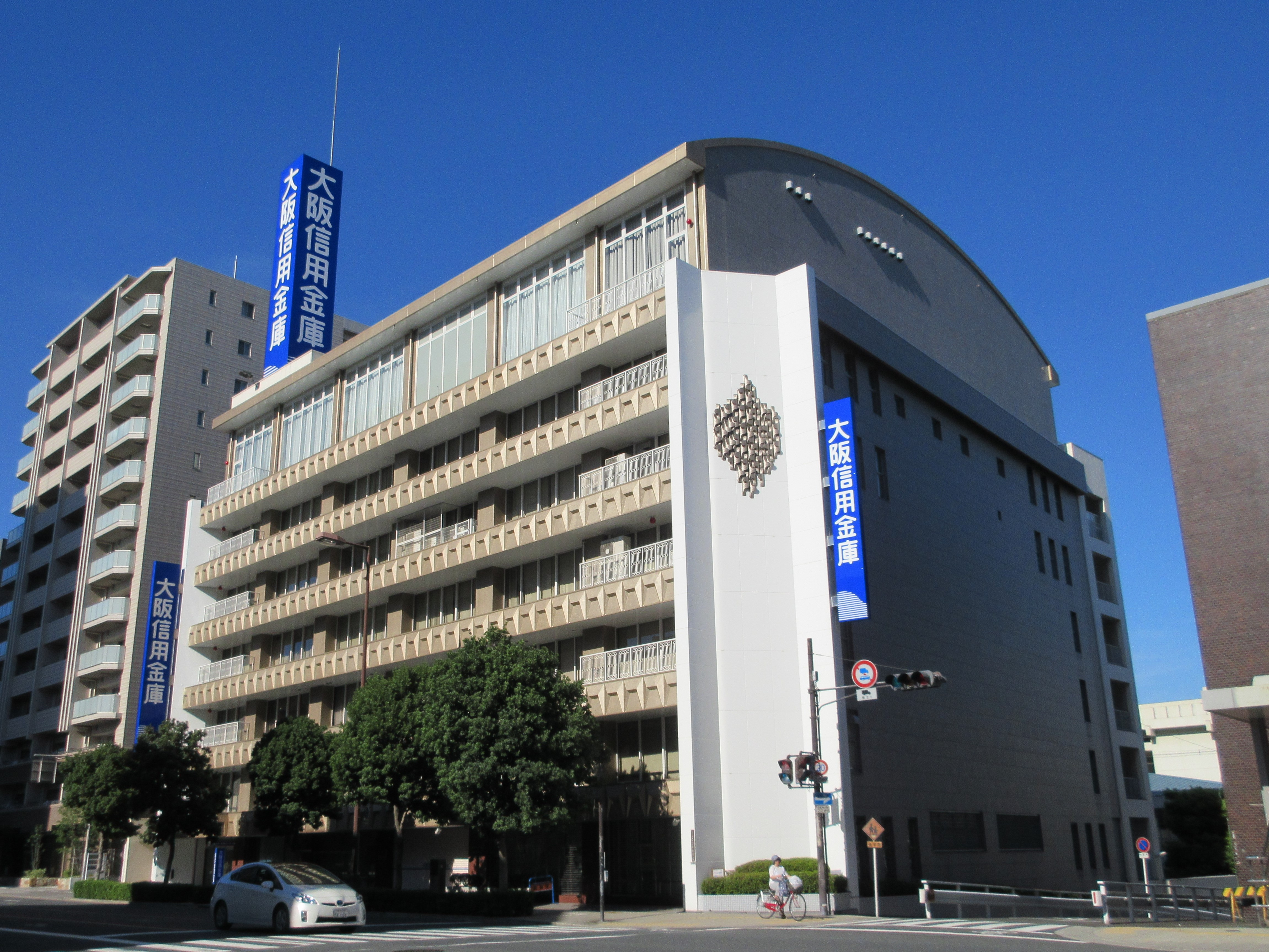 大阪信用金庫本店